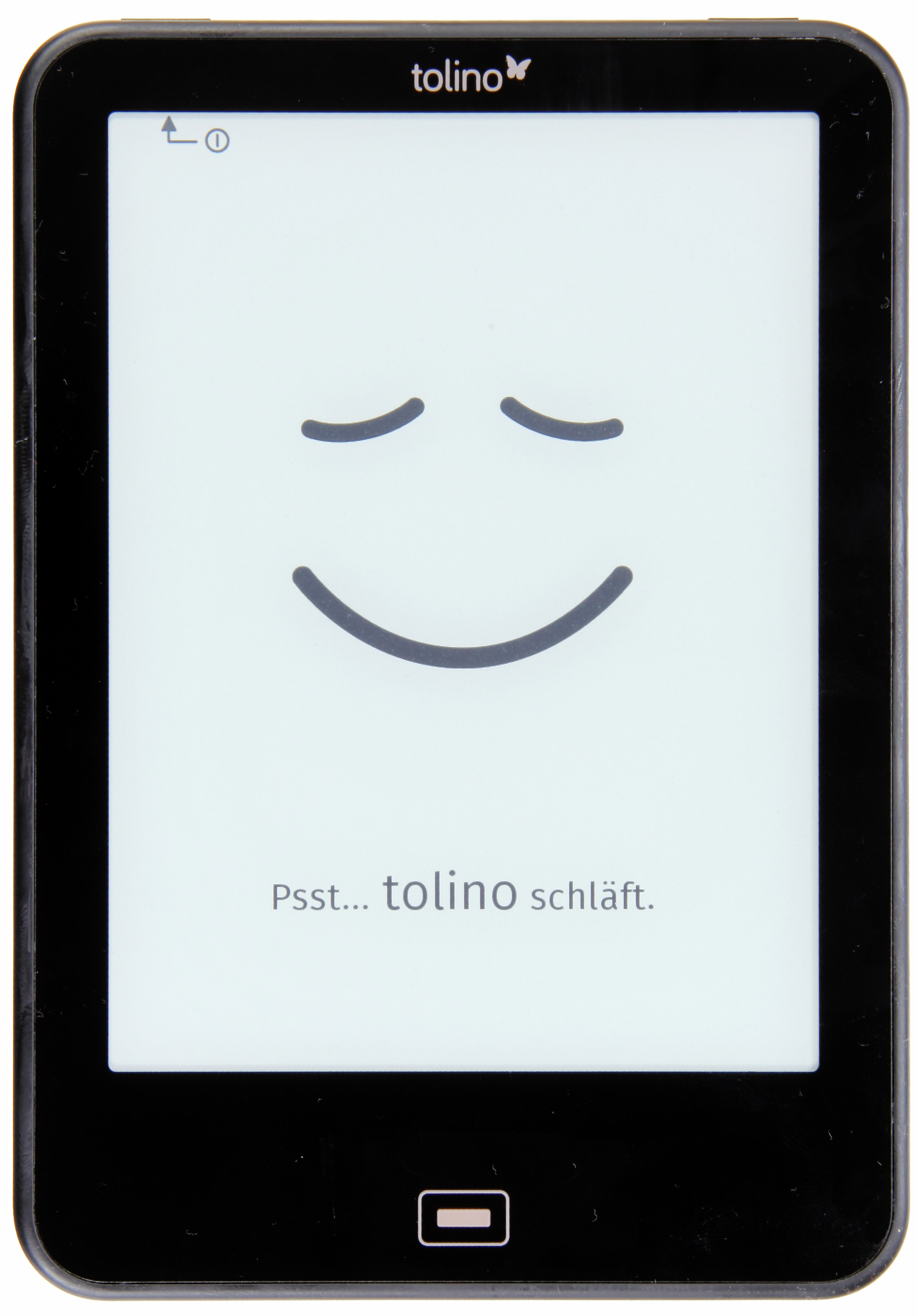 Standby Bildschirm